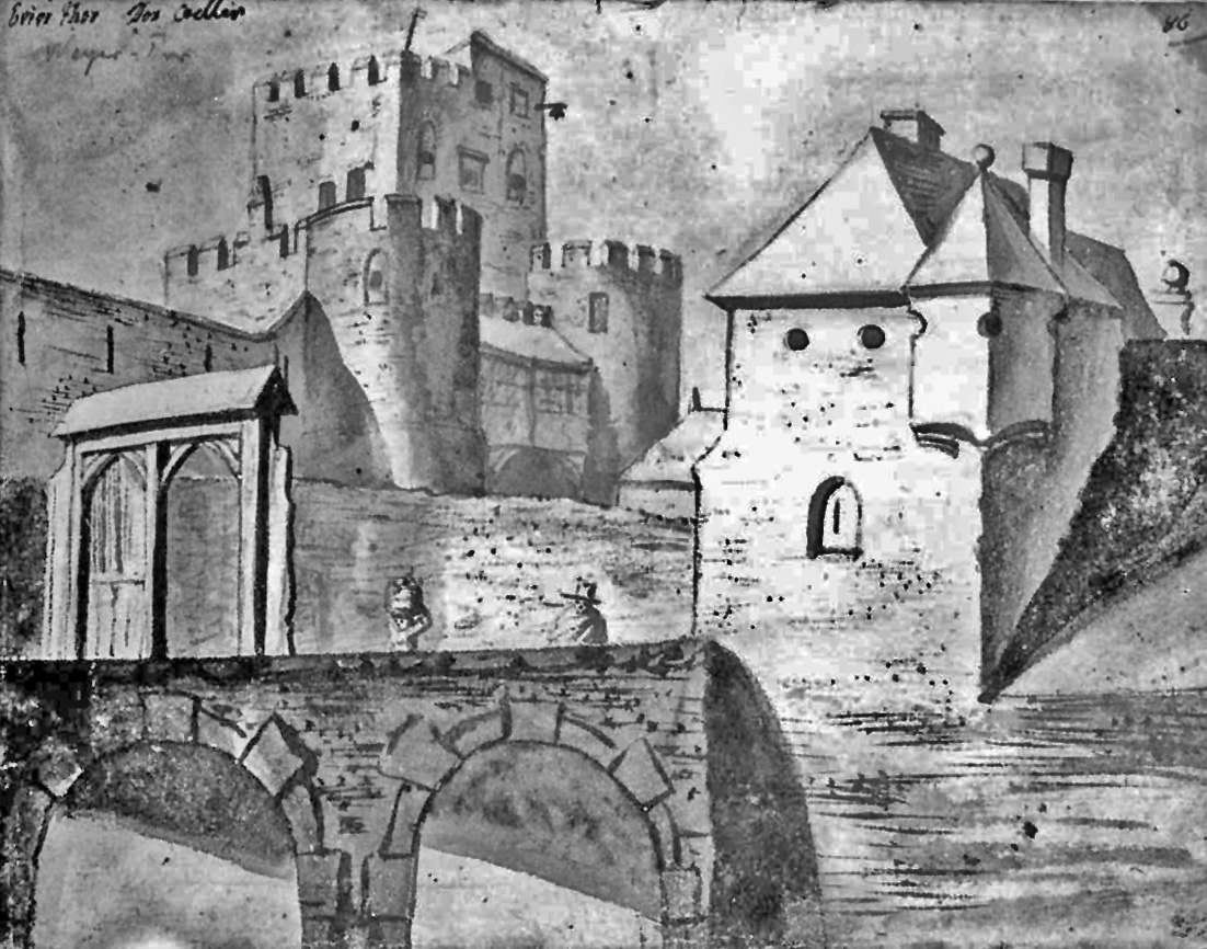 Weyertor, Köln 17. Jahrhundert. Diagonale Ansicht von der Feldseite mit der dem Torbau seit 1632 unmittelbar vorgelagerten Bastion